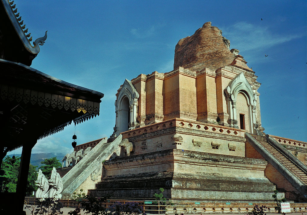 Wat Chedi Luang, Chiang Mai, Thailand, May 2000